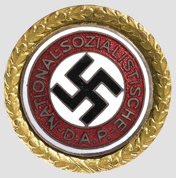 Goldenes Parteiabzeichen im Luftfahrtmuseum Wien 2006